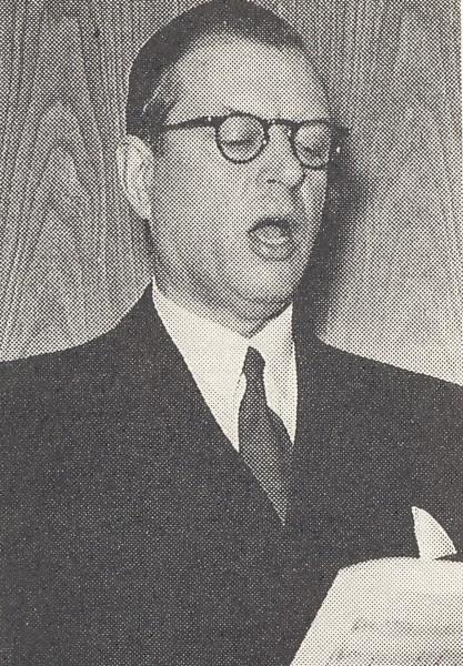 Arkitekt Sven Markelius